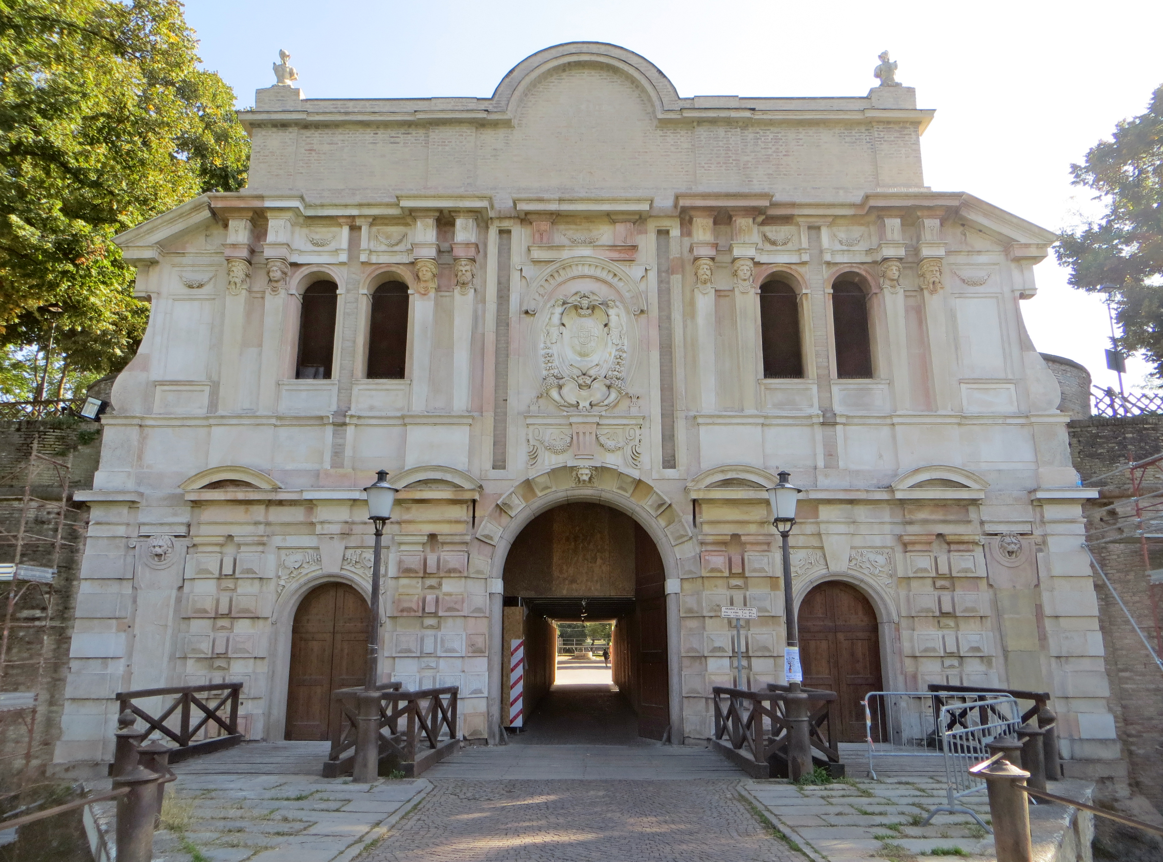 Ingresso monumentale della Cittadella This is a photo of a monument which is part of cultural heritage of Italy.